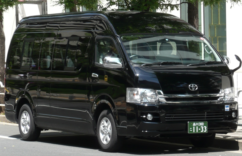 Toyota Hiace.